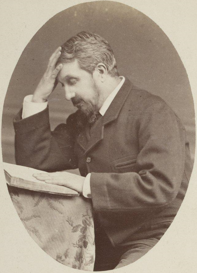 Louis Marie Adolphe, baron d'Avril, né à Paris le 17 août 1822, mort au château de Coppières (ou Copierres), à Montreuil-sur-Epte, le 27 octobre 1904, est un diplomate et écrivain français.